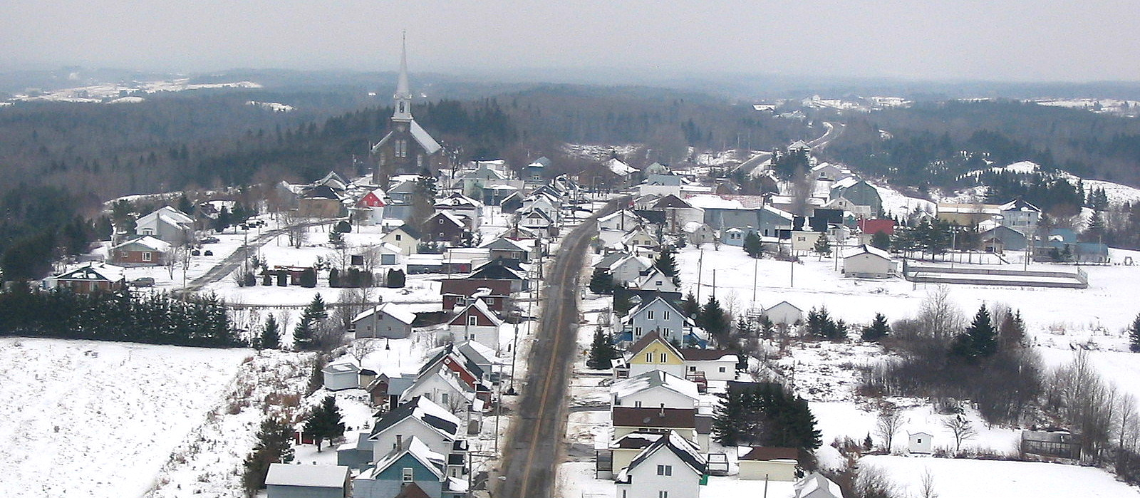 Vue aérienne de Saint-Paul-de-la-Croix, au Québec (Canada)